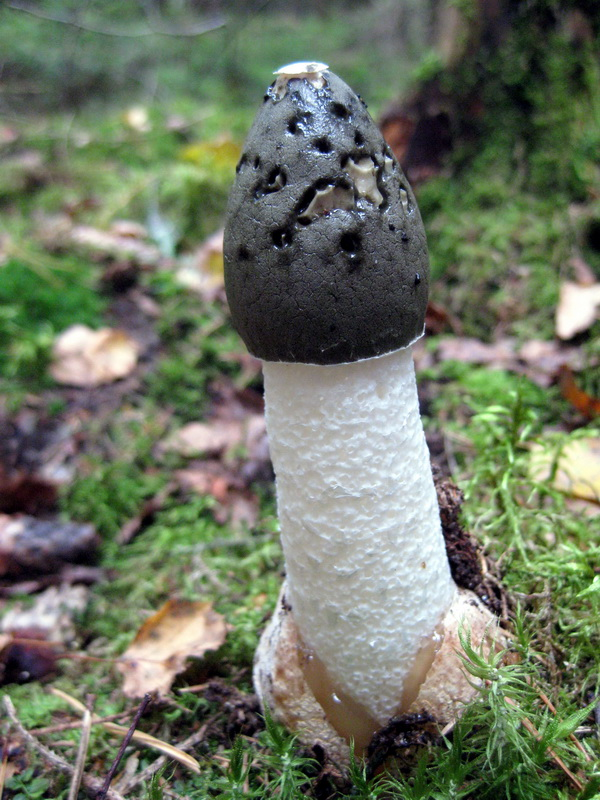 Гриб Веселка. Минский р-н